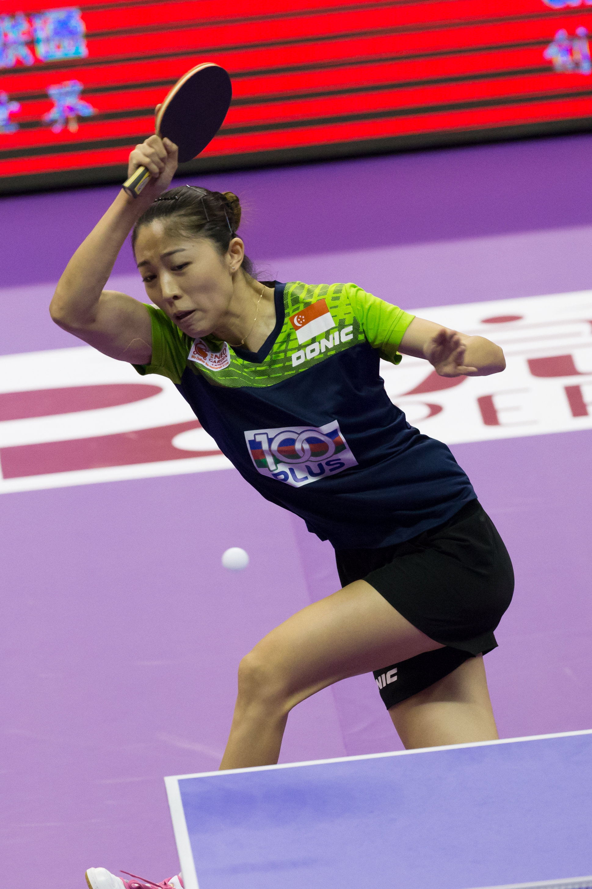 _K0K9769